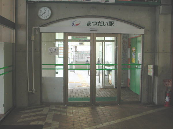 道の駅まつだいふるさと会館、ほくほく線まつだい駅入口